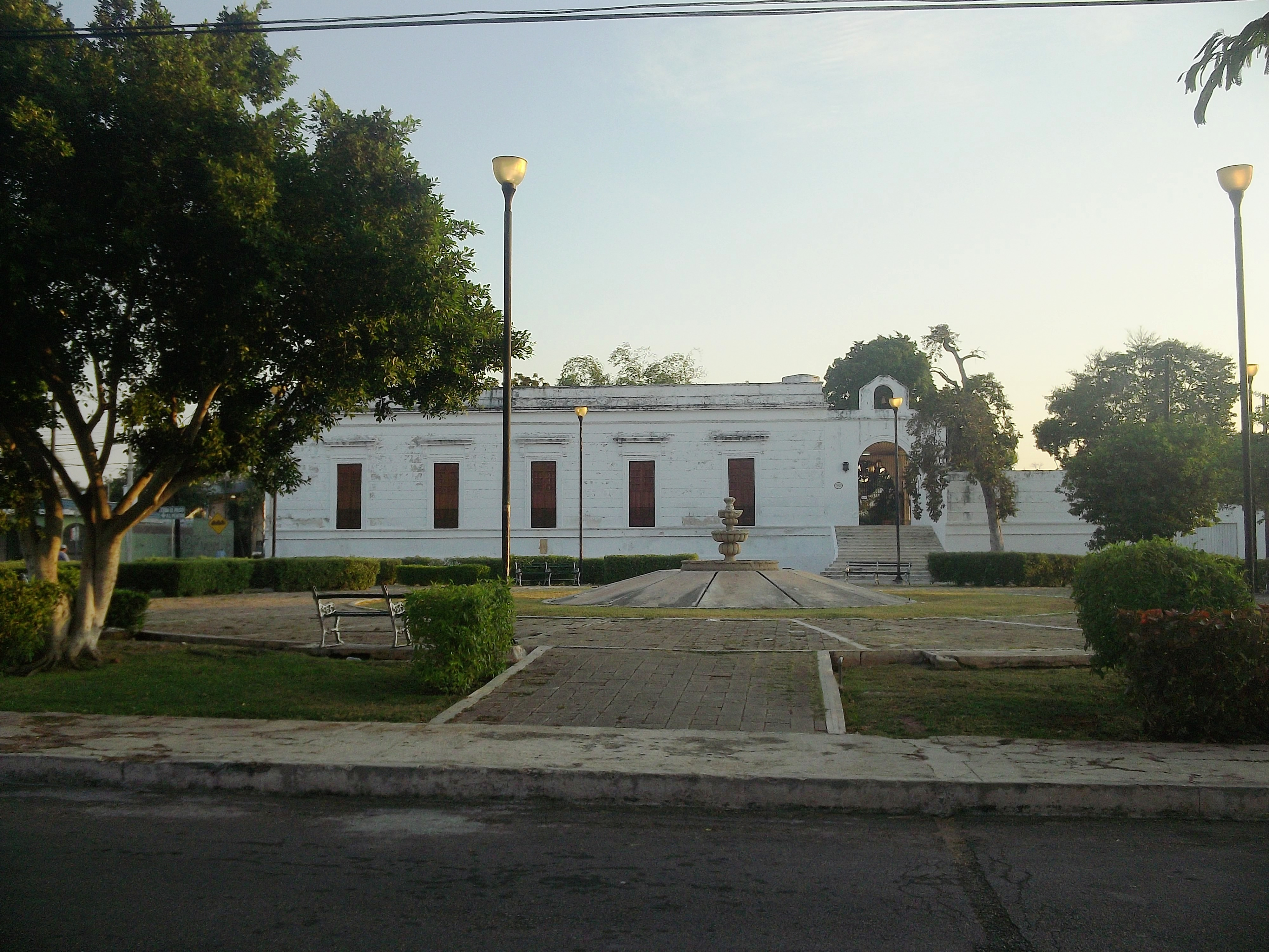 Exhacienda Tanlum en Mérida, Yucatán.